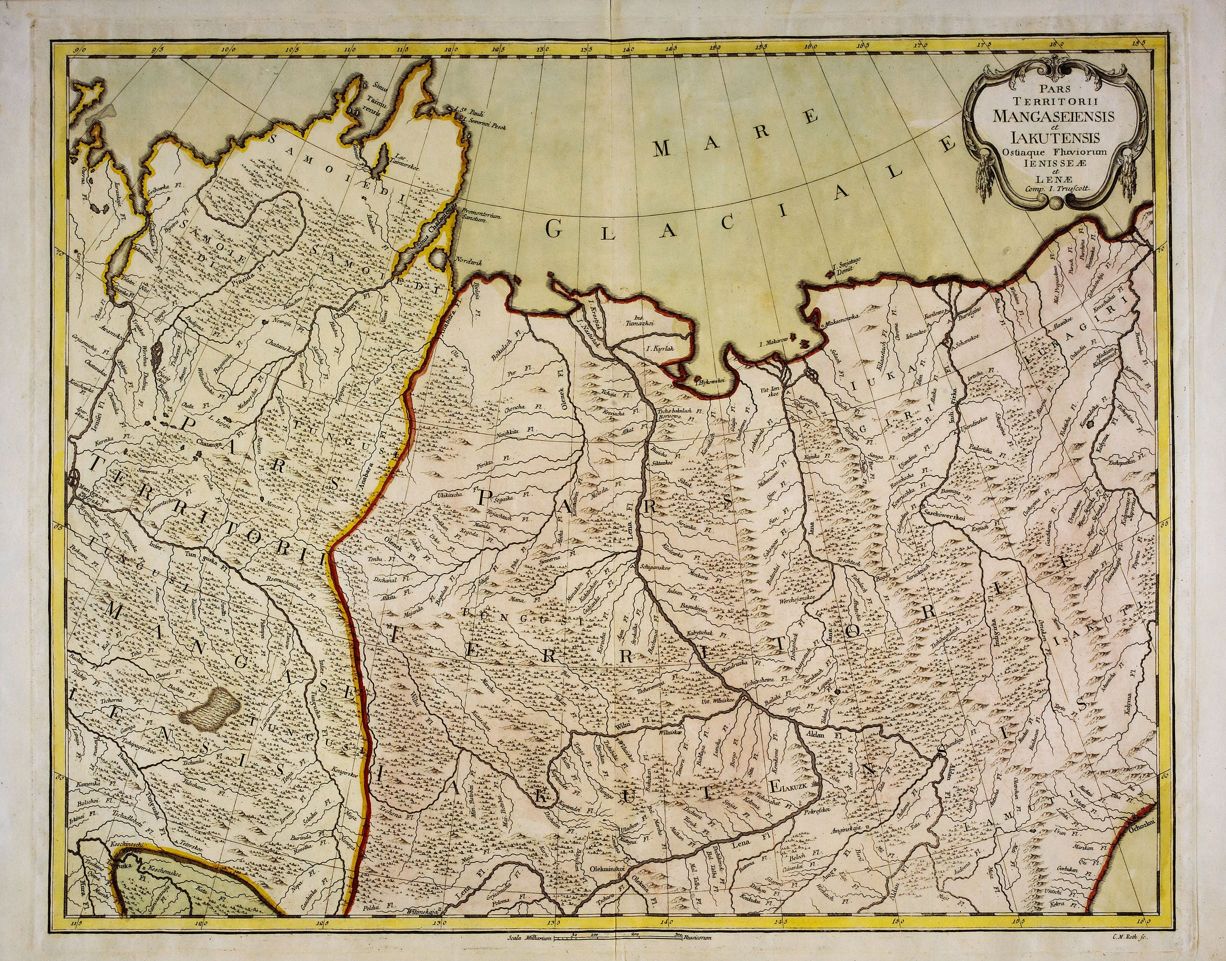 Часть территории Мангазеи до Лены и Якутска. 1760 год